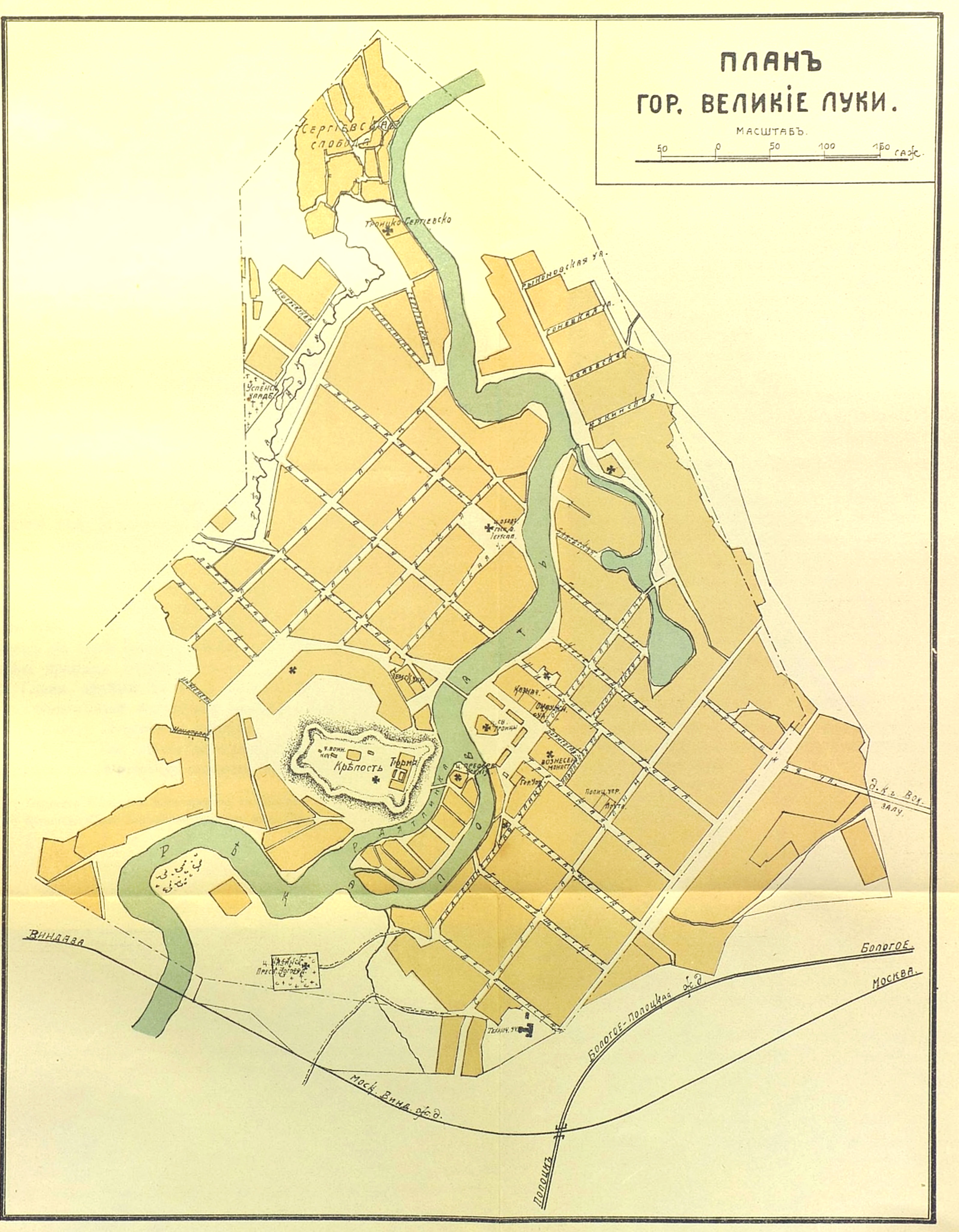 План Великих Лук в 1909 году. "Спутник по Московско-Виндавской железной дороге". М. : Печатня С. П. Яковлева, 1909